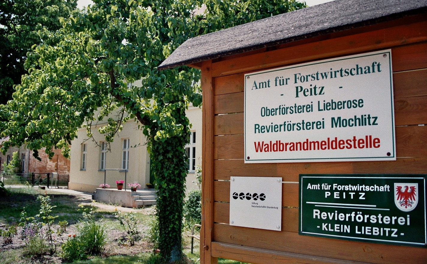 Amtsschilder der Oberförsterei Lieberose und der Revierförstereien Mochlitz und Klein Liebitz des Amts für Forstwirtschaft Peitz des Landesbetriebs Forst Brandenburg sowie der Stiftung Naturlandschaften Brandenburg vor dem Kavalierhaus, dem Nebengebäude des Schlosses Lieberose in Lieberose, Landkreis Dahme-Spreewald, Brandenburg, Deutschland. Die genannten Einrichtungen sind in dem sanierten und restaurierten Gebäude untergebracht.